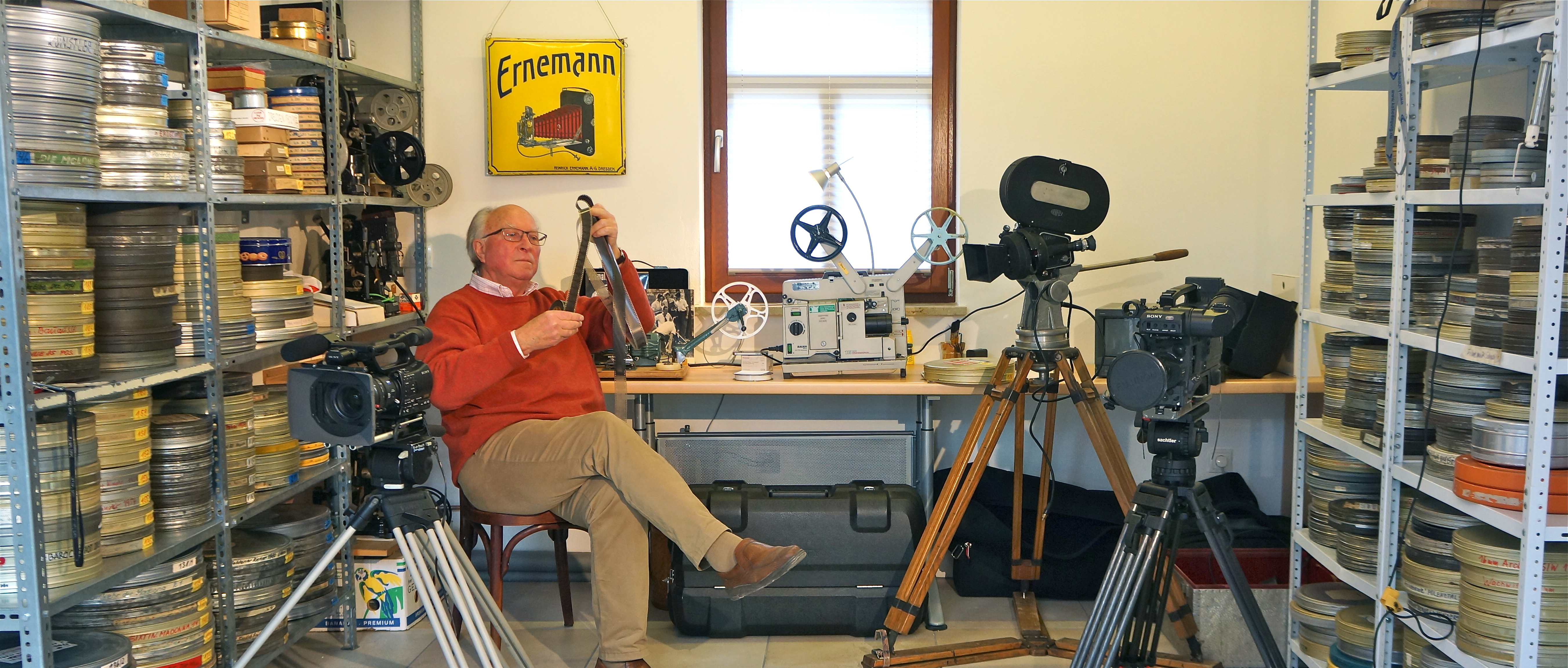 Der deutsche Kameramann Ernst Hirsch im Dezember 2013